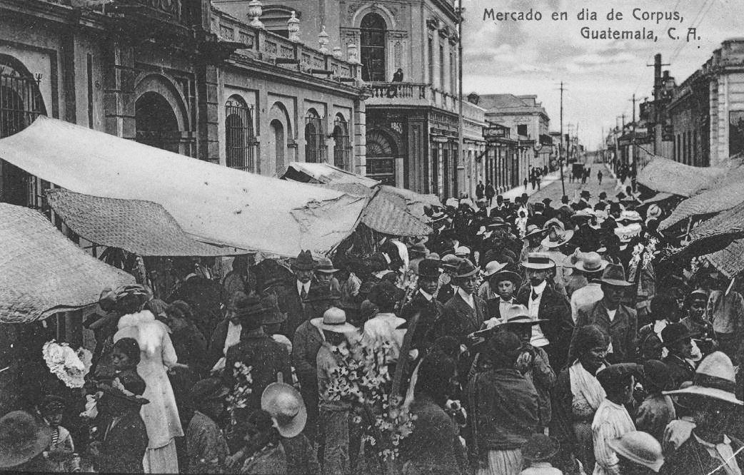 Celebración de Corpus frente a la entrada del Colegio de Infantes a principios del siglo XX.